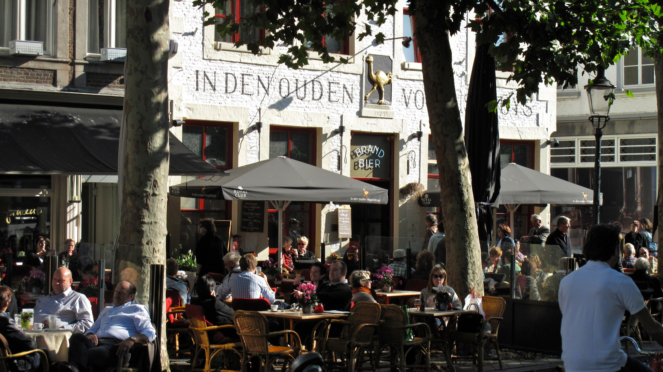 randonnée urbaine 11.10.10